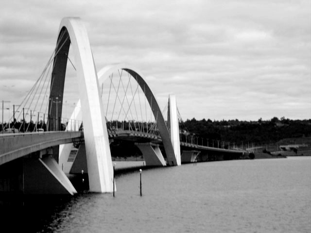 Juscelino Kubitschek Bridge (Ponte Juscelino Kubitschek)